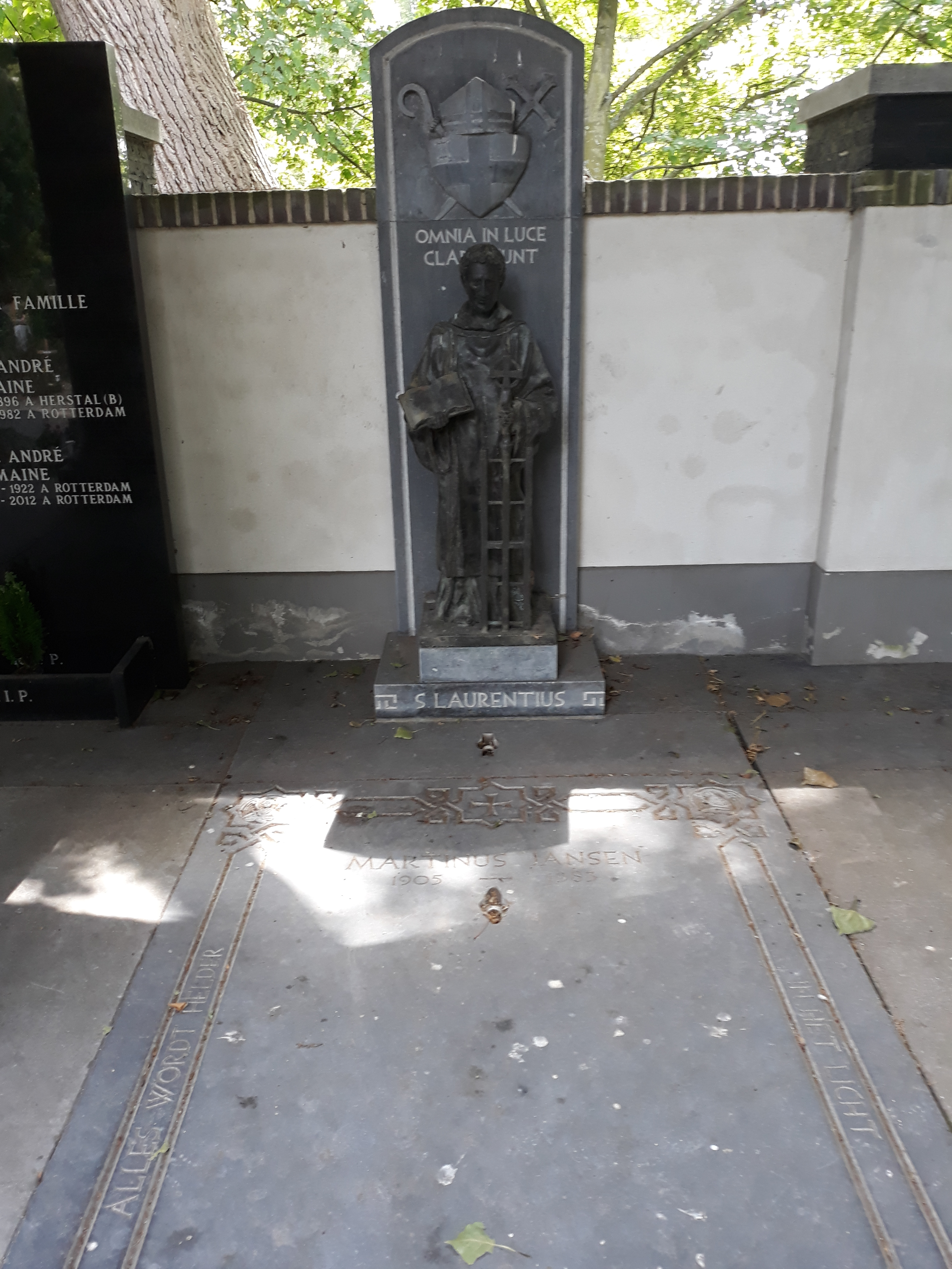 Das Grab des ersten katholischen Bischofs von Rotterdam, Martinus Jansen, auf dem katholischen Laurentiusfriedhof in Rotterdam.